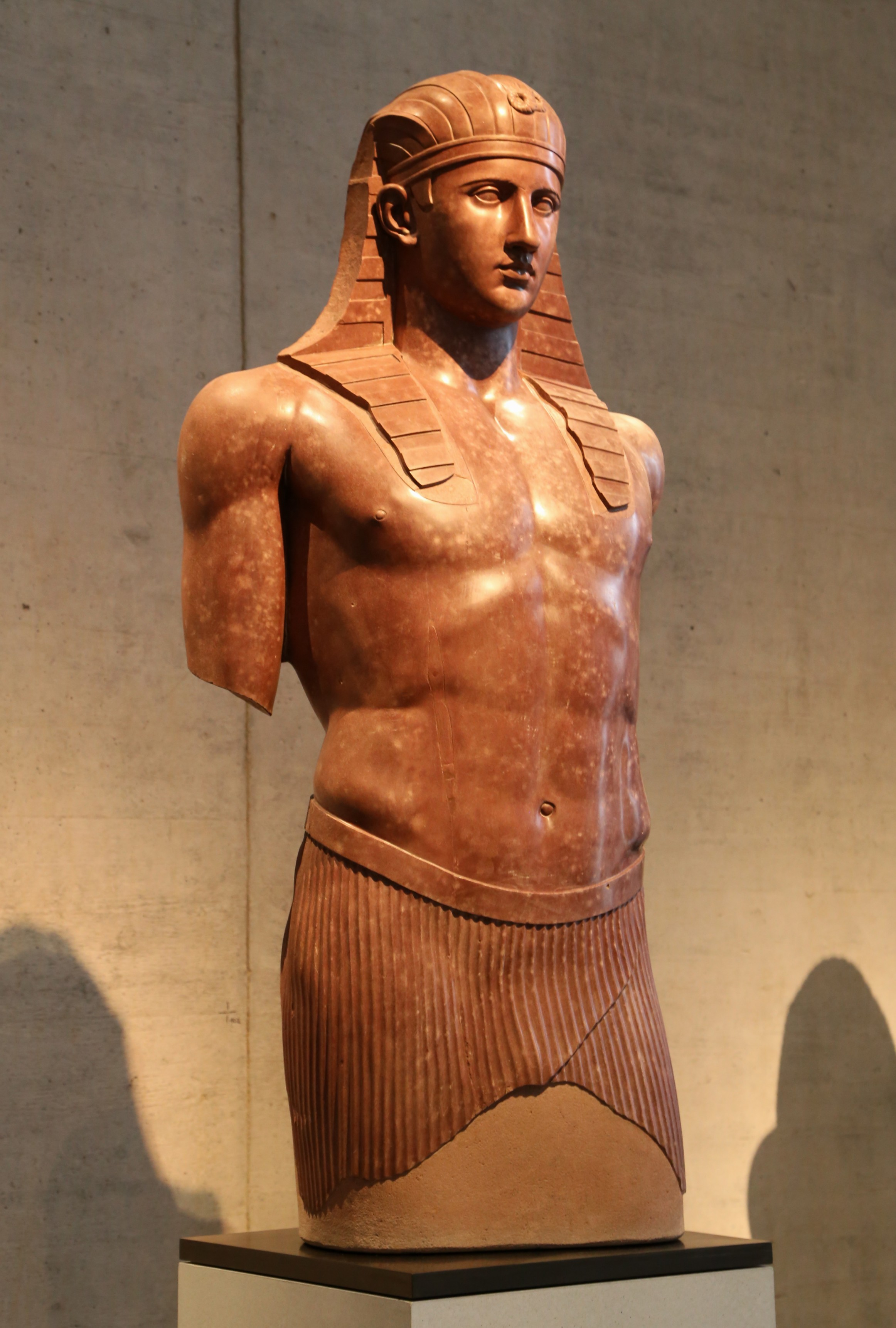 Ägyptisierende Stand-Schreitfigur des Antinoos, Villa Hadriana (Tivoli), um 135 n. Chr., Marmor